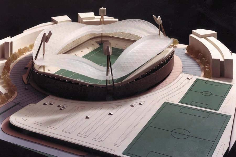 דגם של אצטדיון הכדורגל החדש של נתניה הנבנה בדרום-מזרח העיר